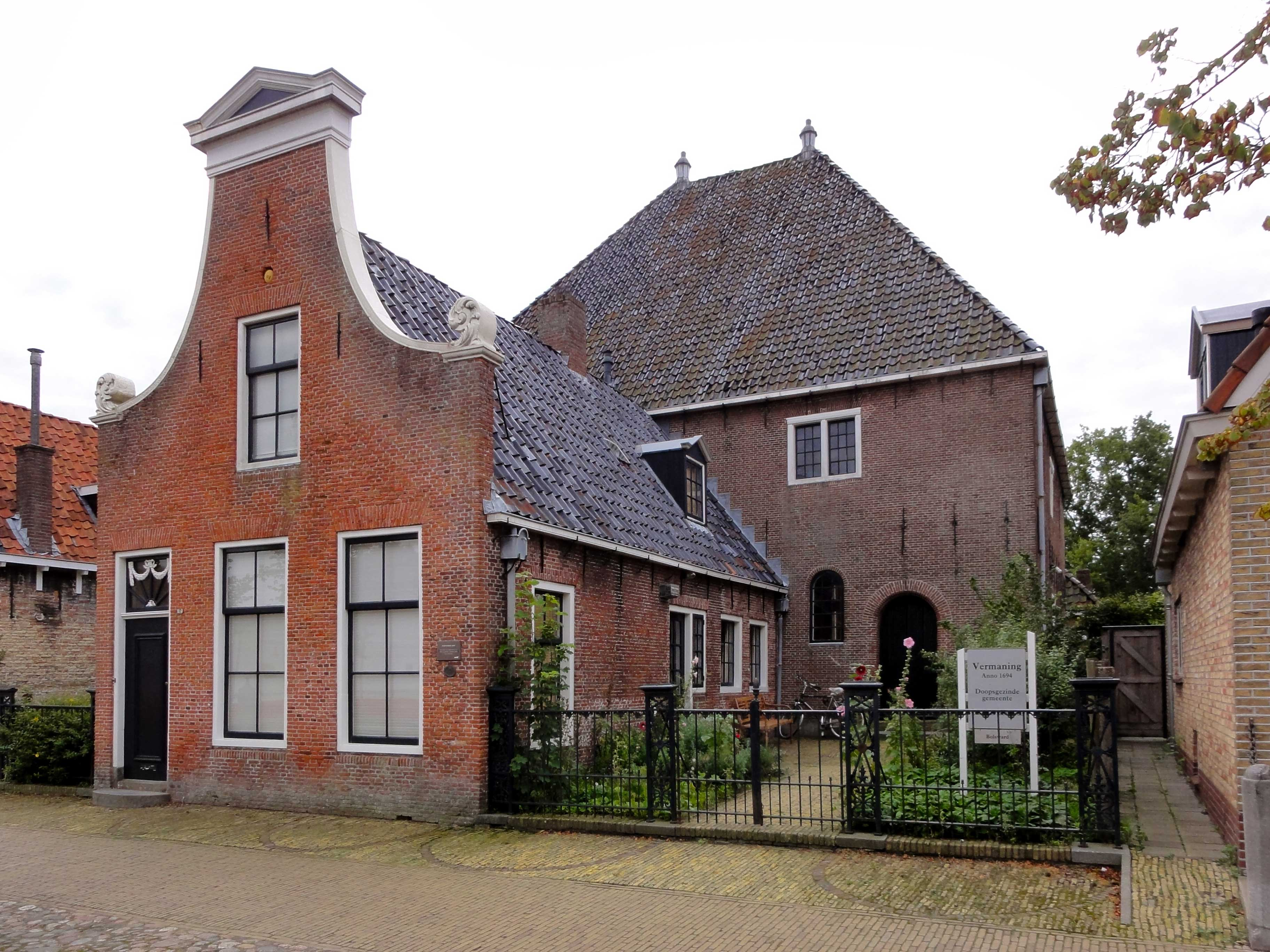 Noard 100 en 102 Workum